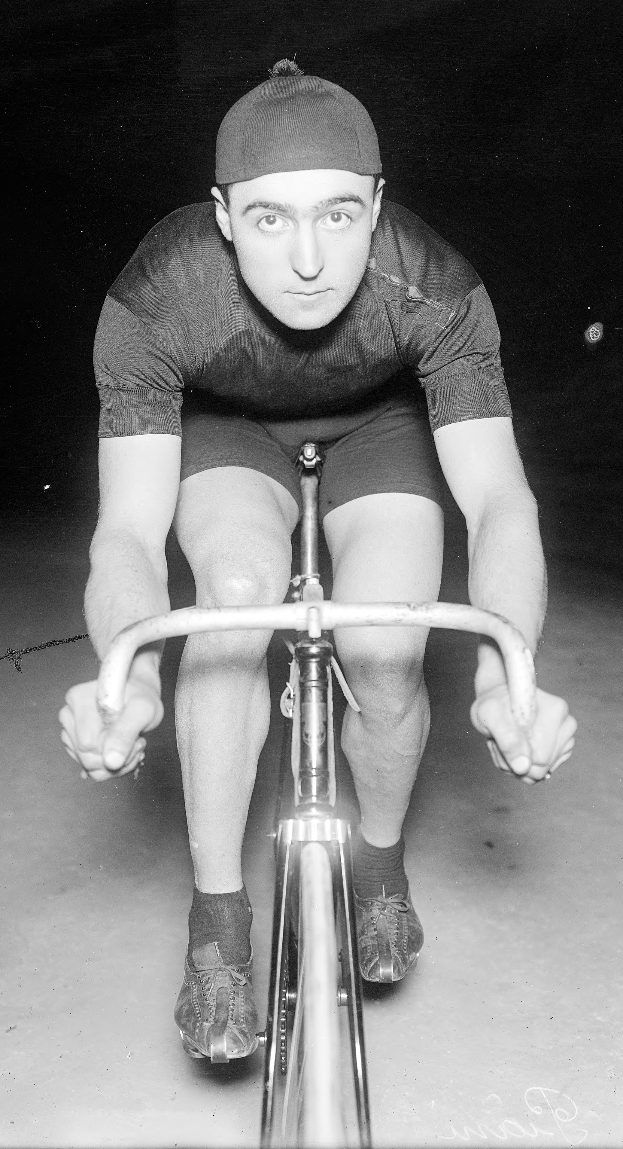 Orlando Piani (coureur cycliste italien disputant une course au vélodrome d'hiver le 30-11-19).